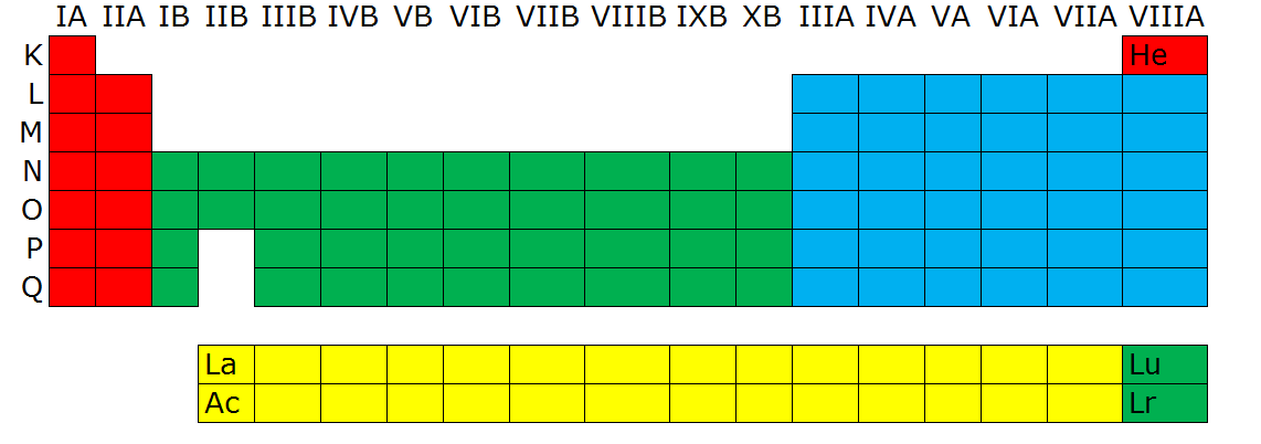 Em vermelho, os elementos que possuem o último elétron no subnível s; em azul, os elementos que possuem o último elétron no subnível p; em verde, os elementos que possuem o último elétron no subnível d; em amarelo, os elementos que possuem o último elétron no subnível f